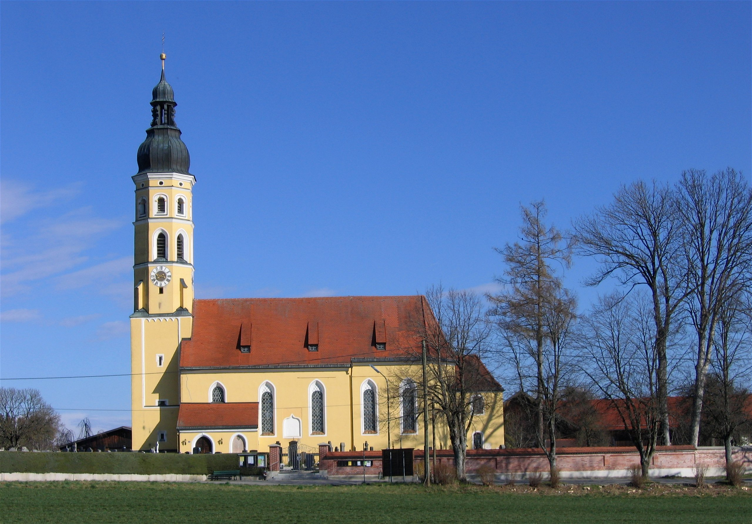 Michelistraße 34. Kath. Pfarrkirche St. Michael, spätgotischer Saalbau mit eingezogenem dreiseitig geschlossenem Chor mit angefügter Sakristei, Anfang 16. Jh., romanischer Turmunterbau um 1315, barocker Umbau der Kirche 1686, Turmlaterne 1887; mit Ausstattung; historische Friedhofsmauer, in Teilen erhalten.